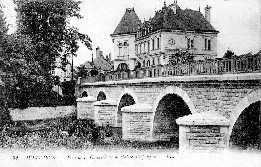 Le pont de la Chaussée et la Caisse d'Épargne, Montargis, Loiret, France